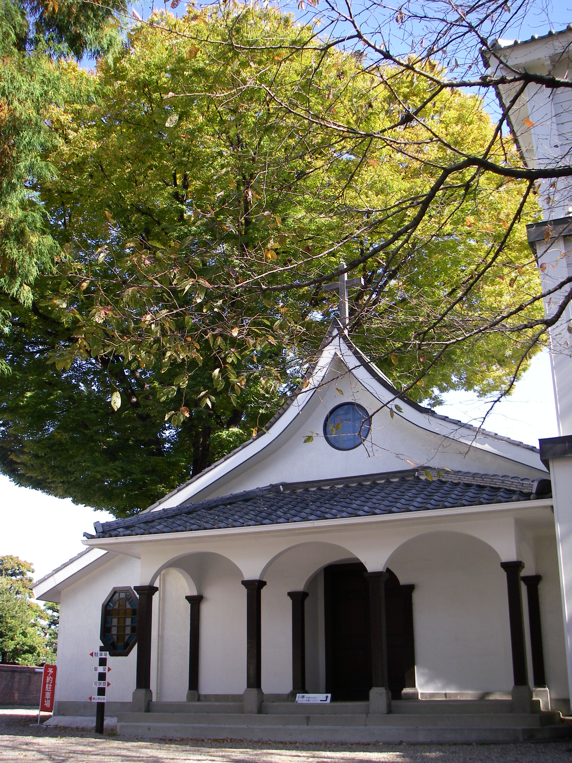 カトリック主税町教会（名古屋市東区主税町三丁目） 礼拝堂およびケヤキ（共に名古屋市の都市景観重要建築物等に指定）